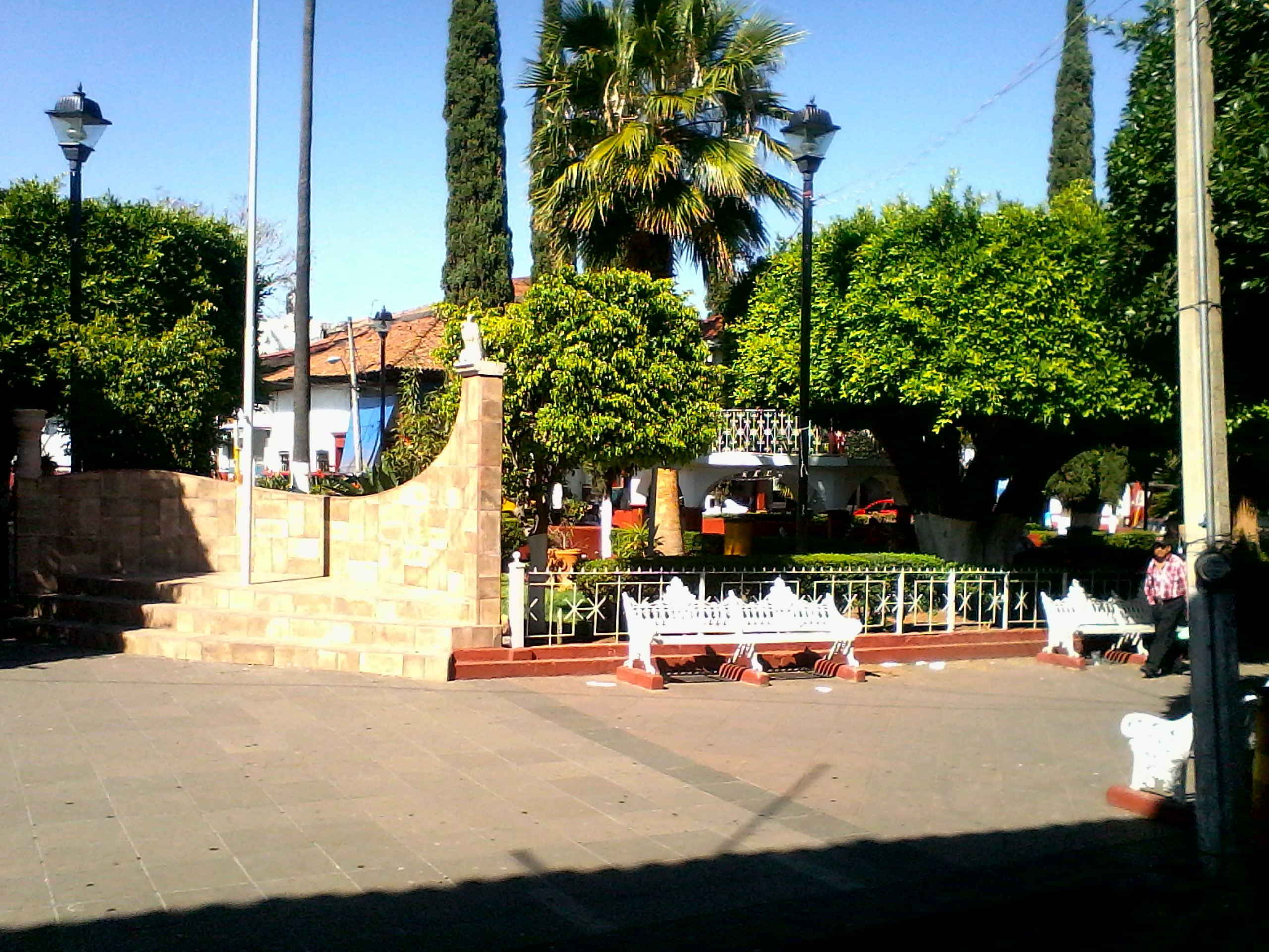 Plaza principal de Panindícuaro, Mich.